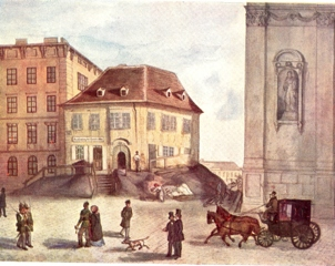 Gerold-Haus in der Dominikanerbastei